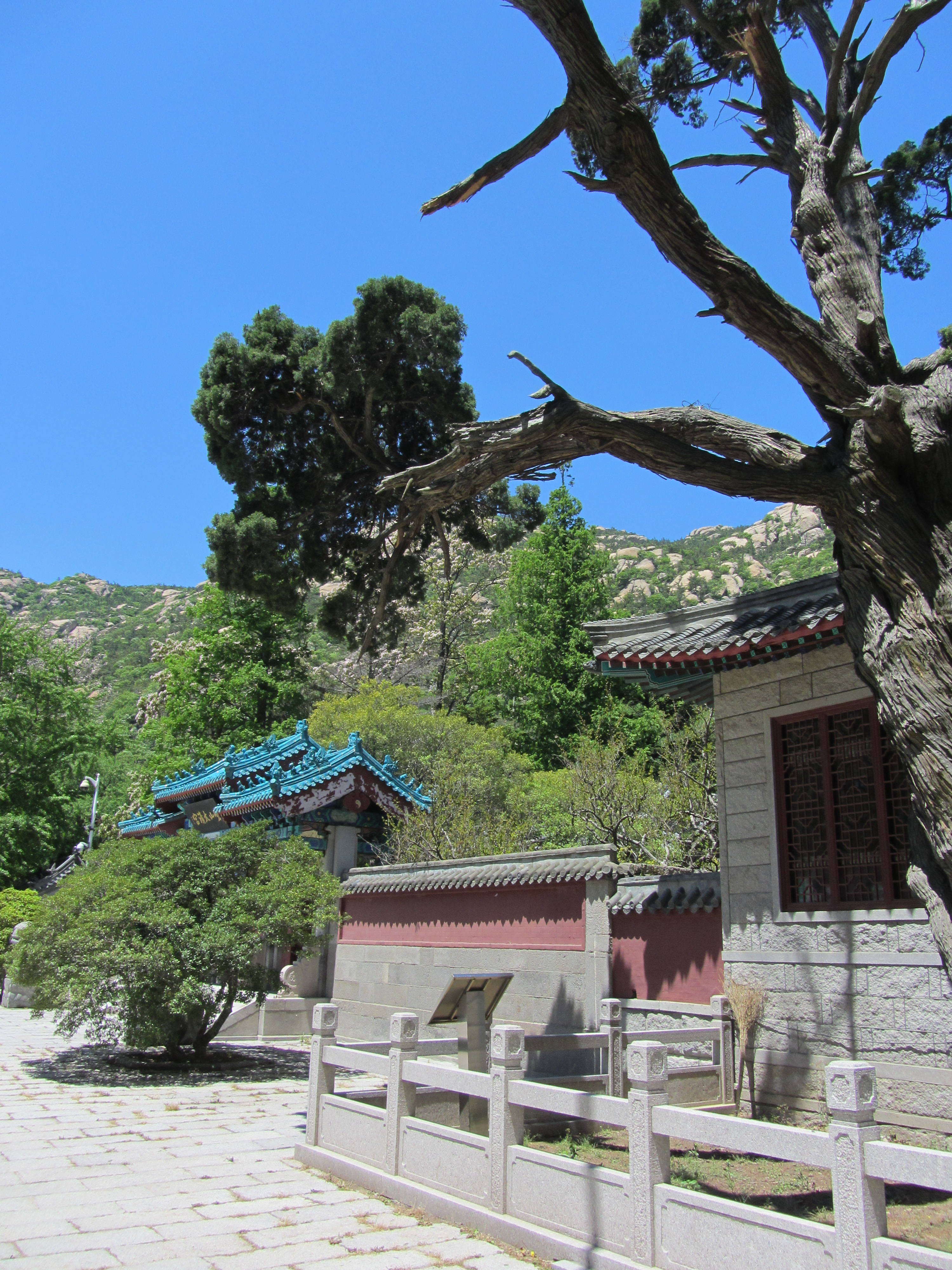 Tor im Taiqingtempel im Laoshangebirge in China bei Qingdao